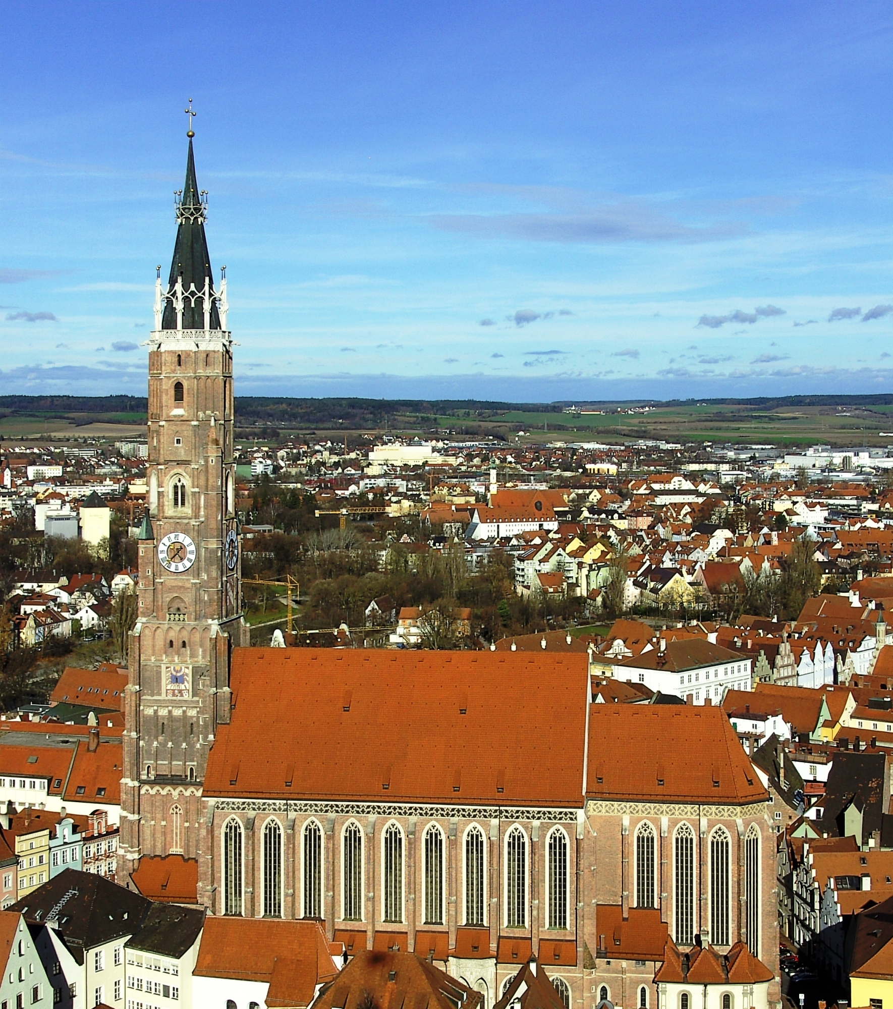 Die Stadtpfarr- und Kollegiatstiftskirche St. Martin und Kastulus in Landshut von der Burg Trausnitz aus gesehen.